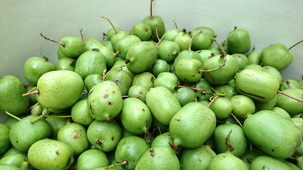 Актинидия коломикта, или кишмыш (садовая форма) Actinidia kolomikta, плоды. Юг Приморского края, Россия